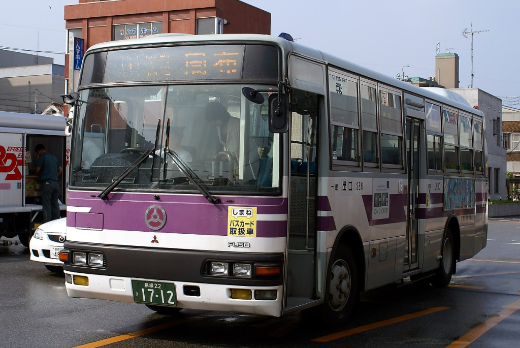 事業者: 石見交通 陸運登録: 島根22き17-12 シャーシ: 三菱ふそう U-MK218J 車体: MBM 年式: 1995年式 撮影場所: JR浜田駅前 撮影日: 2006/08/20 撮影者: Nishiko